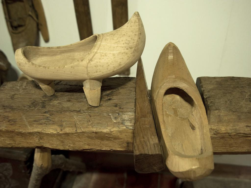 Albarcas. Museo Etnográfico de Cantabria